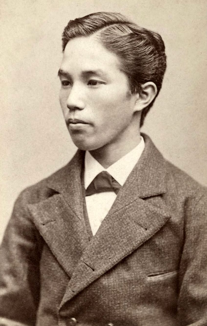 Portrait of Kaneko Kentaro. Meiji era